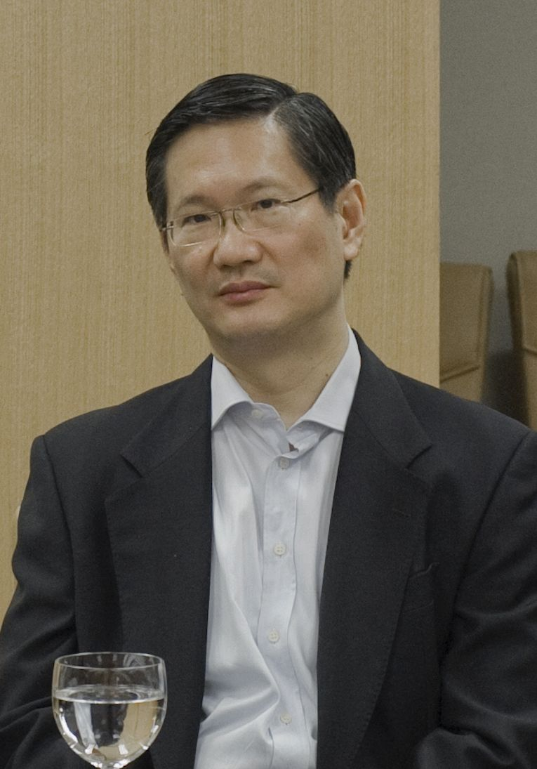 นายกรัฐมนตรี เป็นประธานการประชุมผู้บริหารระดับสูงของภาคเอกชนพบนายกรัฐมนตรี พร้อมร่วมรับประทานอาหารกลางวัน ณ อาคารจามจุรีสแควร์ เขตปทุมวัน กรุงเทพฯ วันเสาร์ที่ 26 กุมภาพันธ์ พ.ศ.2554 (Photographer attached to the Prime Minister of the Kingdom of Thailand (H.E.Mr.Abhisit Vejjajiva) : Peerapat Wimolrungkarat / พีรพัฒน์ วิมลรังครัตน์) @is50mm